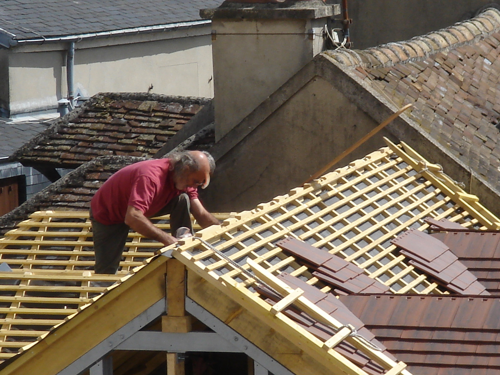 Couvreur travaillant à la construction d'une maison neuve à Paris, en France.